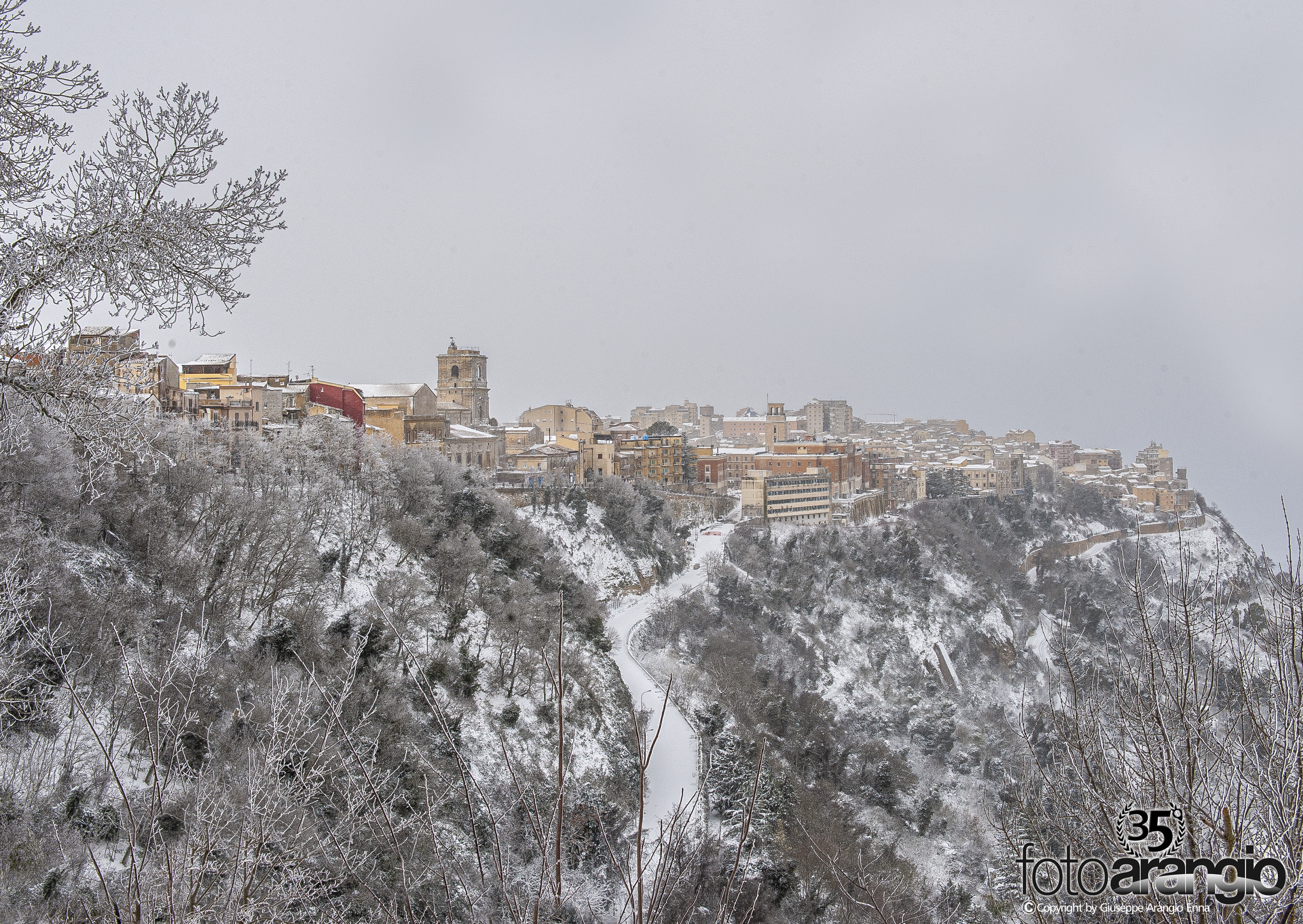 Panorama di Enna innevata 1.100 mt sul livello del mare